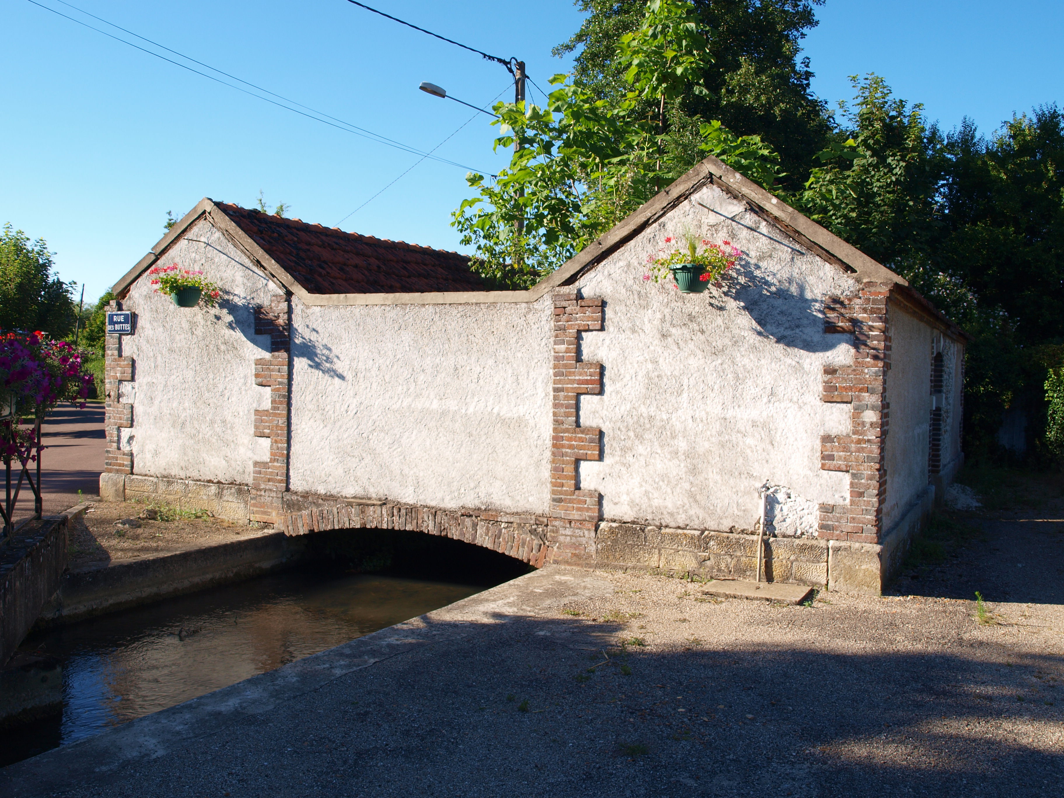 Cézy (Yonne, France) ; lavoir sur une branche du Vrin des Marchands, rue des Buttes.